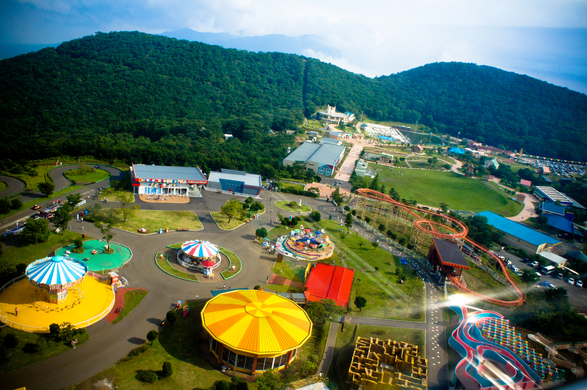 Grinpa